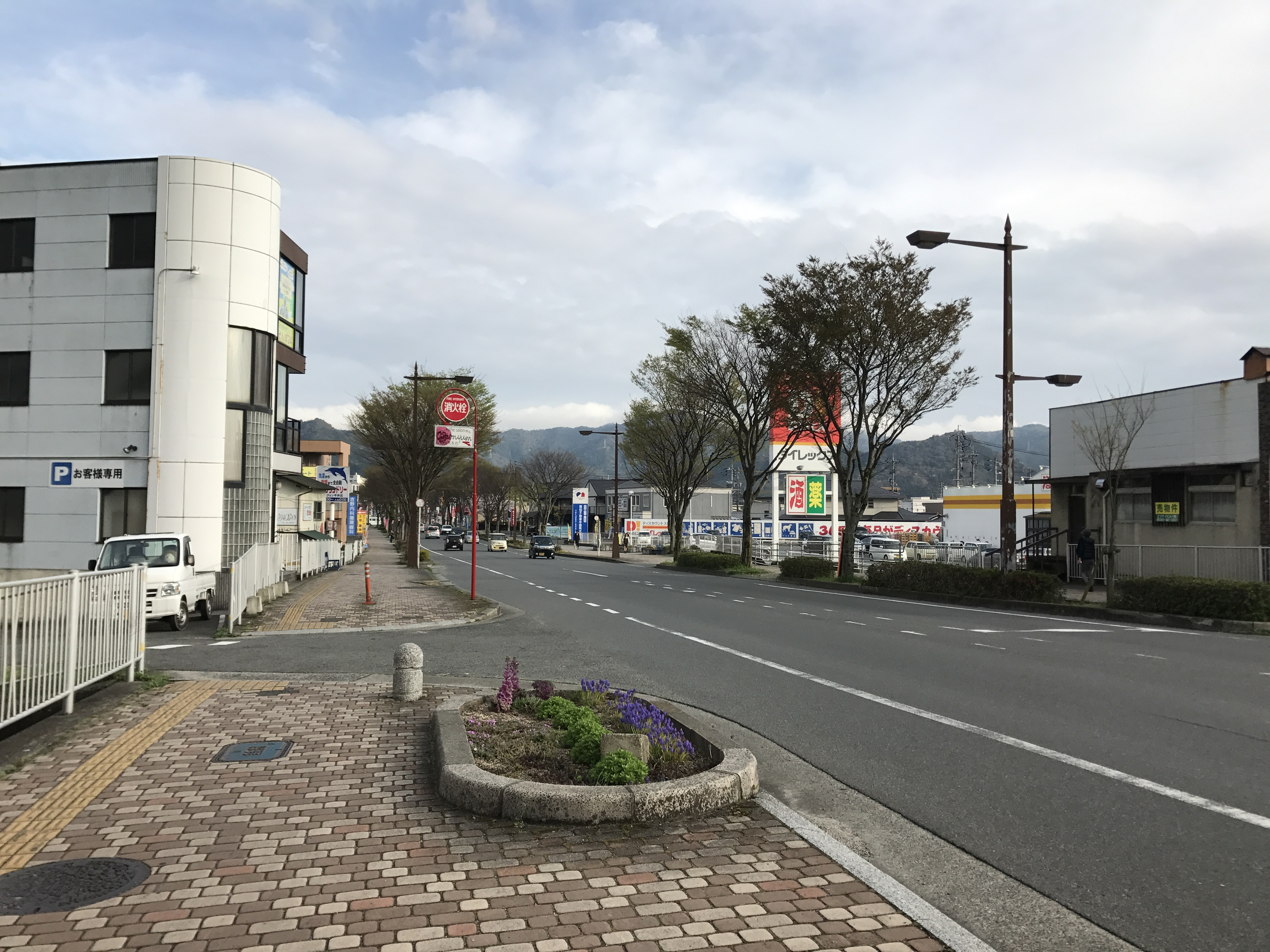 秋穂渡瀬橋南側の山口県道200号